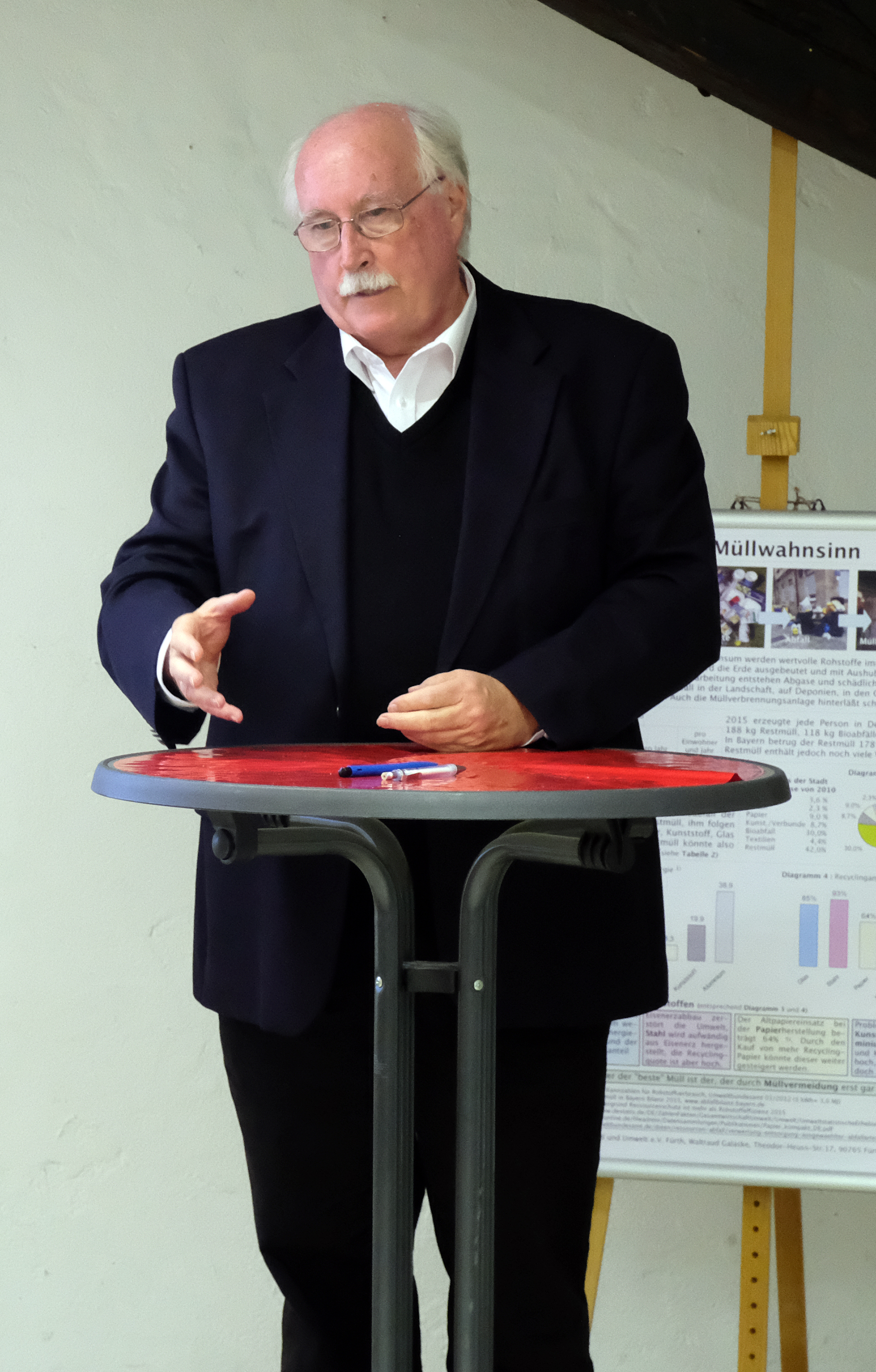 Alt-Oberbürgermeister Wilhelm Wenning, Sept. 2018